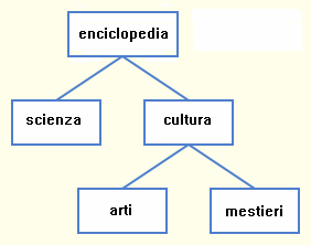 Struttura ad albero binario